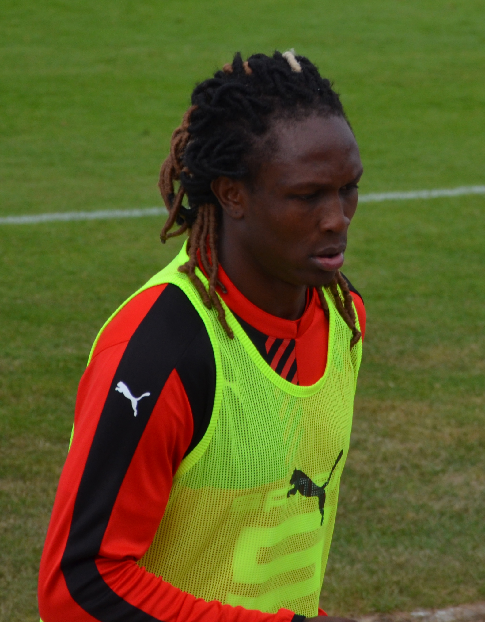 Photographie prise lors du match opposant le Stade rennais au Havre AC en amical au stade Paul-Audrin de Dinard le 8 juillet 2015. Ici, Habib Habibou.